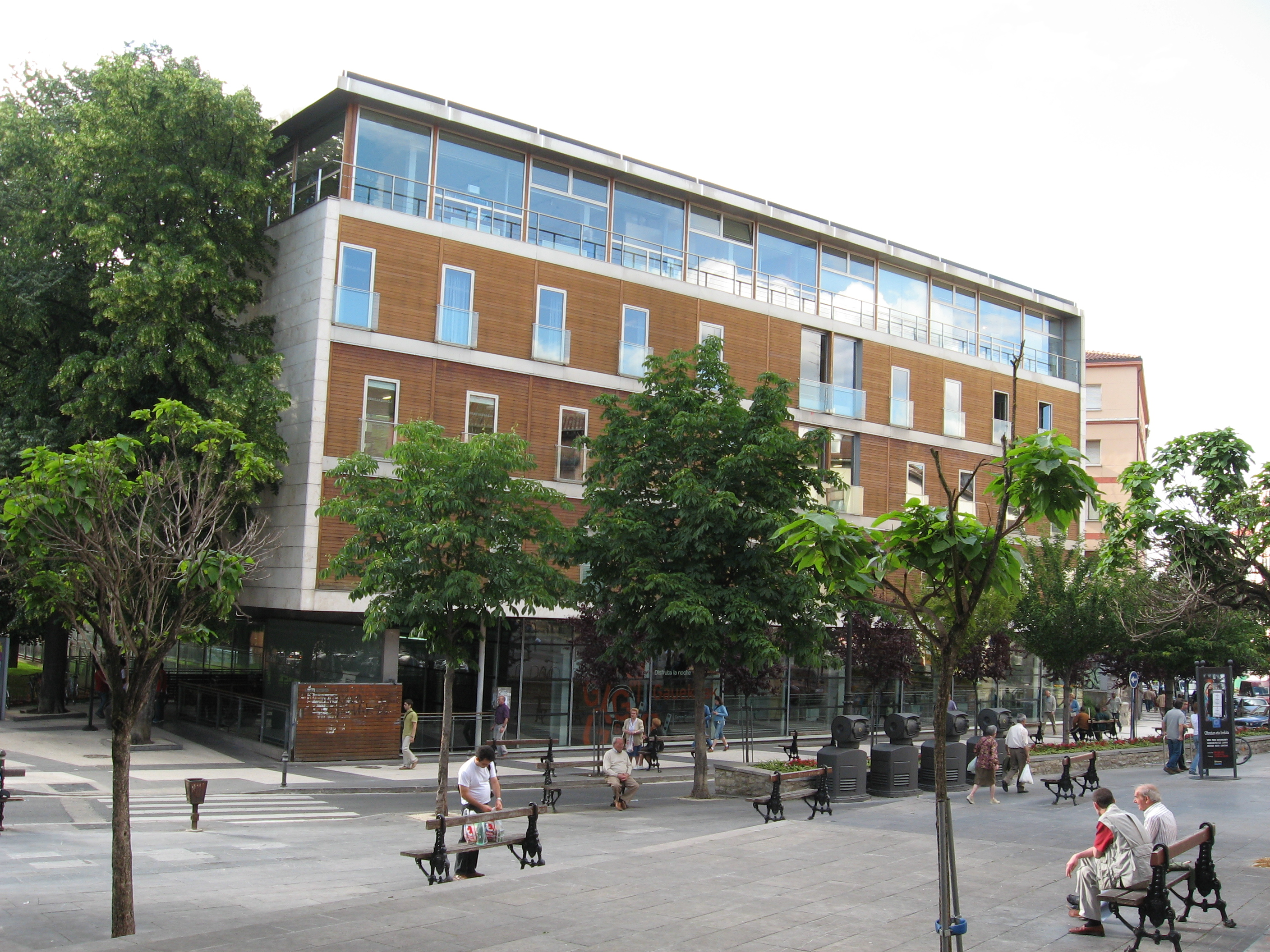 Desc: Centro Cívico Aldabe en Vitoria-Gasteiz